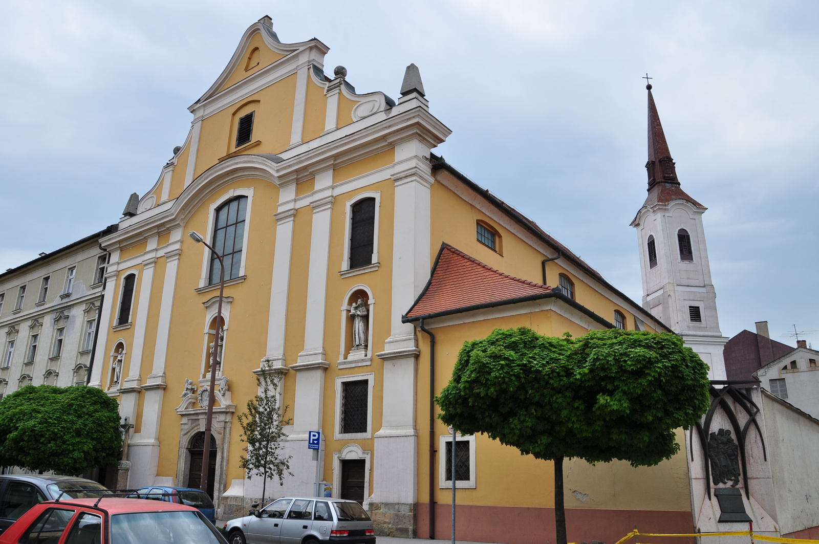 Belvárosi ferences Szent Anna római katolikus templom (Esztergom, Bottyán János utca) This is a photo of a monument in Hungary. Identifier: 6176